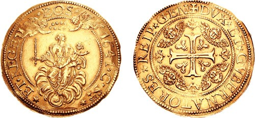 Italia, Genova. Dogi Bienniali. terza monetazione 1637-1797. ::AV Dieci Doppie (66.69 g). Monetiere Cosmas Svarez. Datata 1641. O/: V ETVREGE VEOSV 1641V CVSESV (V sotto ES), Madonna seduta di fronte su nuvole, testa a dx, che tiene lo scettro con la mano dx estesa e il Bambino che estende la sua mano destra nell'altra; Madonna è coronata da un cerchietto di nove stelle da due cherubini che volano sopra. R/: (croce)DVX(stella)ET(stella)GVBERNATORES(stella)REIP(stella)GEN, croce patente ornatada un fiore centrale e pallini in ogni barra concava; fiori sopra i pallini; teste di cherubini alati sopra piume in ogni quarto. ITALY, Genoa. The Biennial Doges. Third coinage 1637-1797. AV Ten Doppie (66.69 gm). Cosmas Svarez, mintmaster. Dated 1641. V ETVREGE VEOSV 1641V CVSESV (V beneath ES), Madonna seated facing on clouds, head right, holding sceptre in extended right hand and cradling Child extending right hand, in left arm; Madonna being crowned with a circlet of nine stars by cherubs flying above / (cross potent)DVX(star)ET(star)GVBERNATORES(star)REIP(star)GEN, ornate cross pattée with central fleur and pellet in each concave bar; fleur above pellet at each end; with winged cherub head above plume in each quarter. :CNI III pg. 354, 3 (this coin); G. Lunardi, Le monete della repubblica di Genova, 253; Pesce & Felloni pp. 121-22; Varesi 256/1 var (different mintmaster); Bellesia 89/A; Friedberg 426; KM 107.